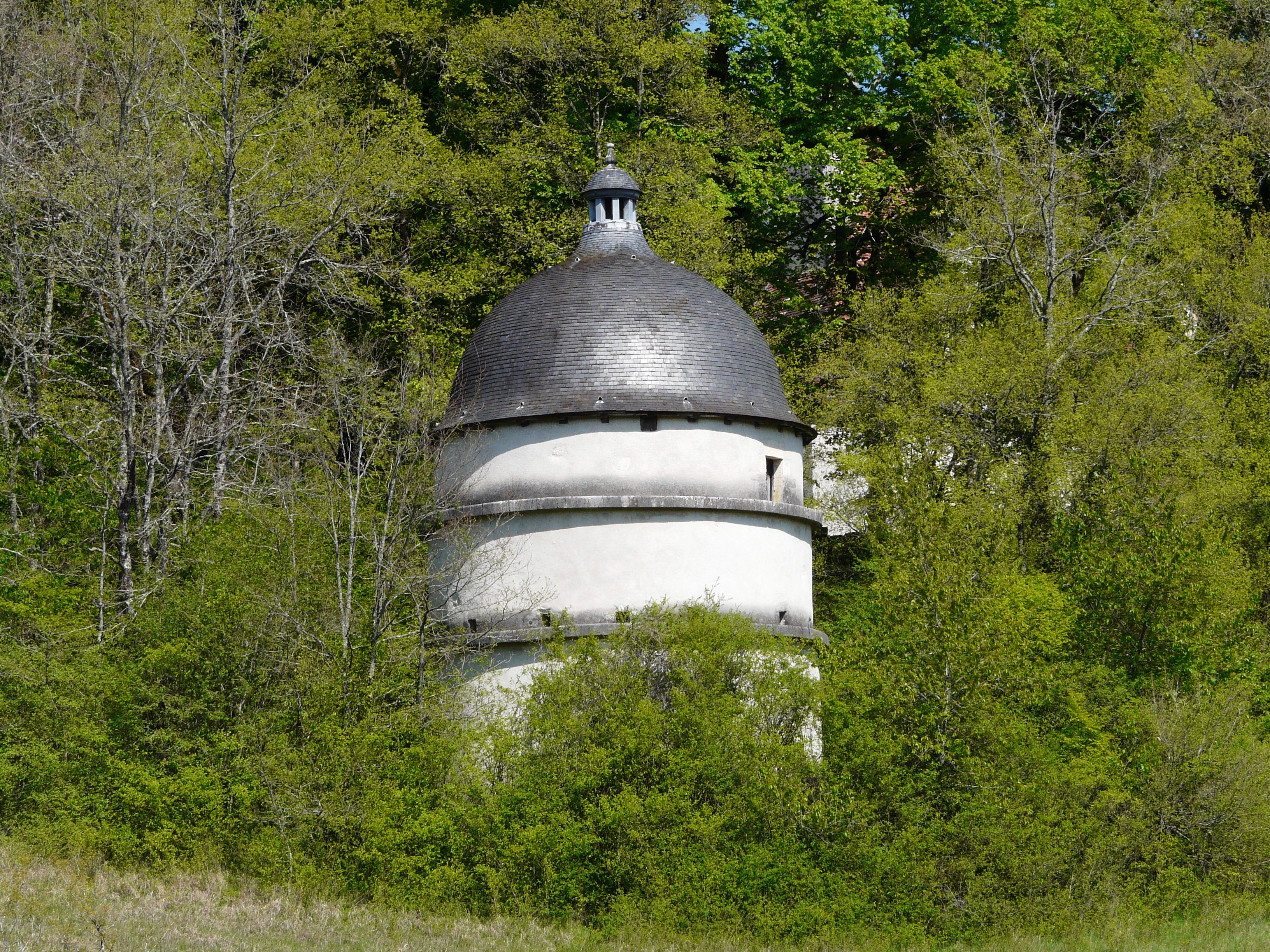 Le pigeonnier du château de Puyguilhem, Villars, Dordogne, France Object location45° 25′ 33.7″ N, 0° 44′ 36.6″ E